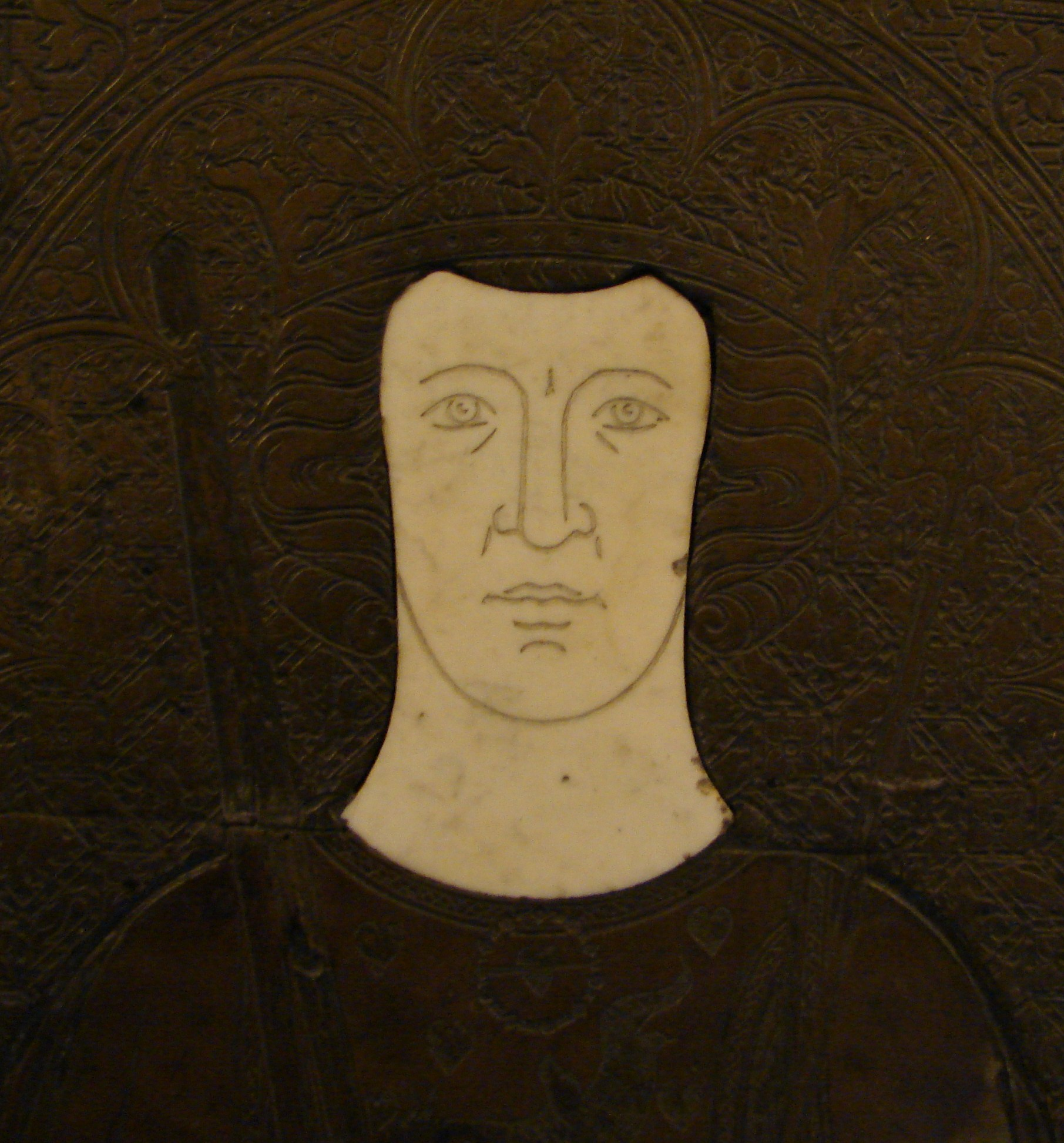 Crop version of Erik Menved, dansk konge, danish king, Ringsted kirke, Sankt Bendts Kirke